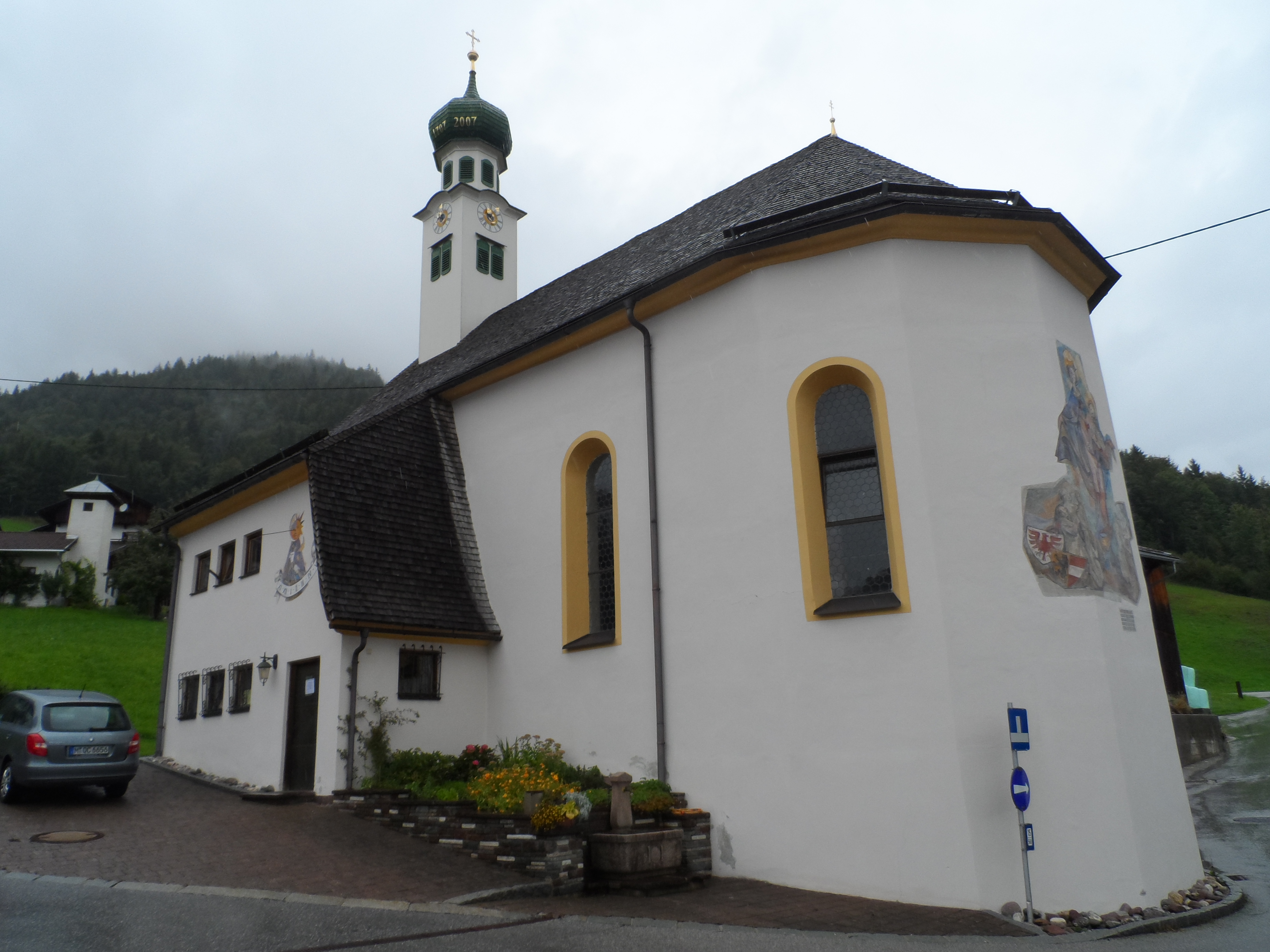 Kath. Filialkirche zum Hl. Kreuz/ Schmerzhafte Muttergottes - Aschau, Brandenberg in Tirol